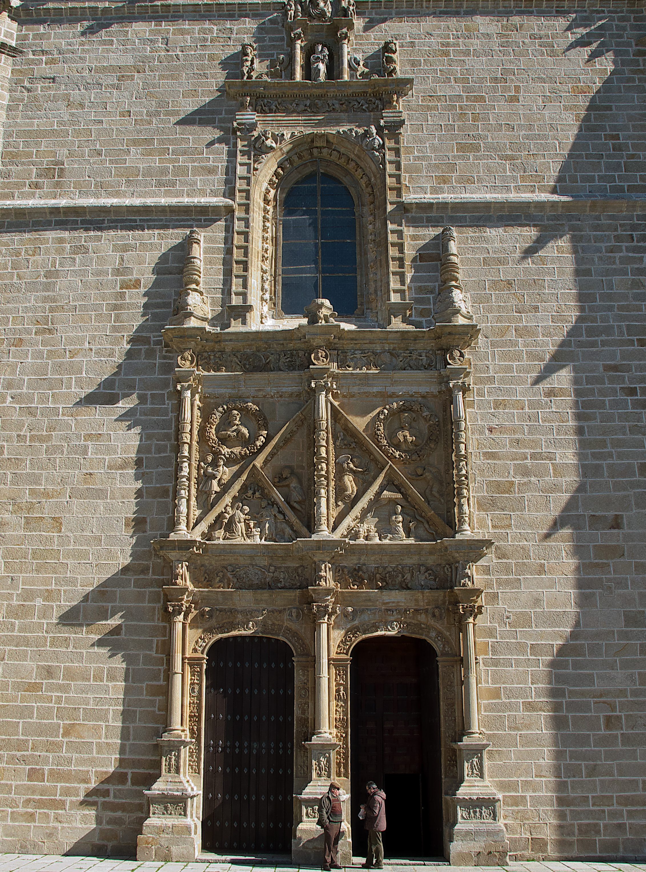 Pedro de Ybarra (1549) proyecta la portada con estructura gótica y decoración plateresca